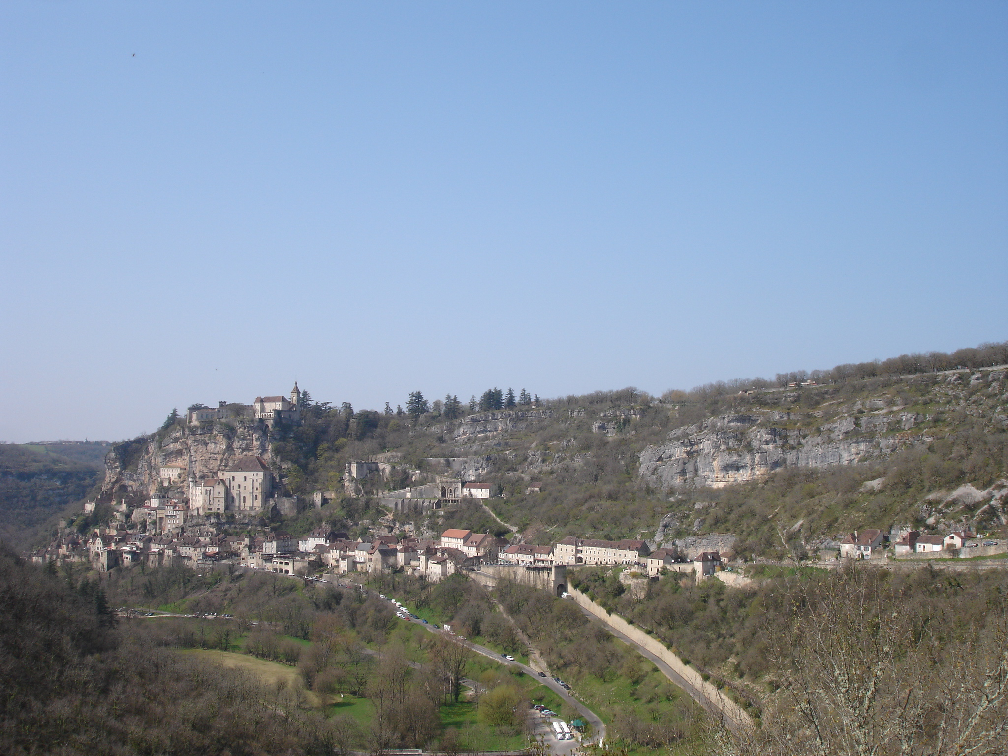 France, Lot (46), Rocamadour, vue générale